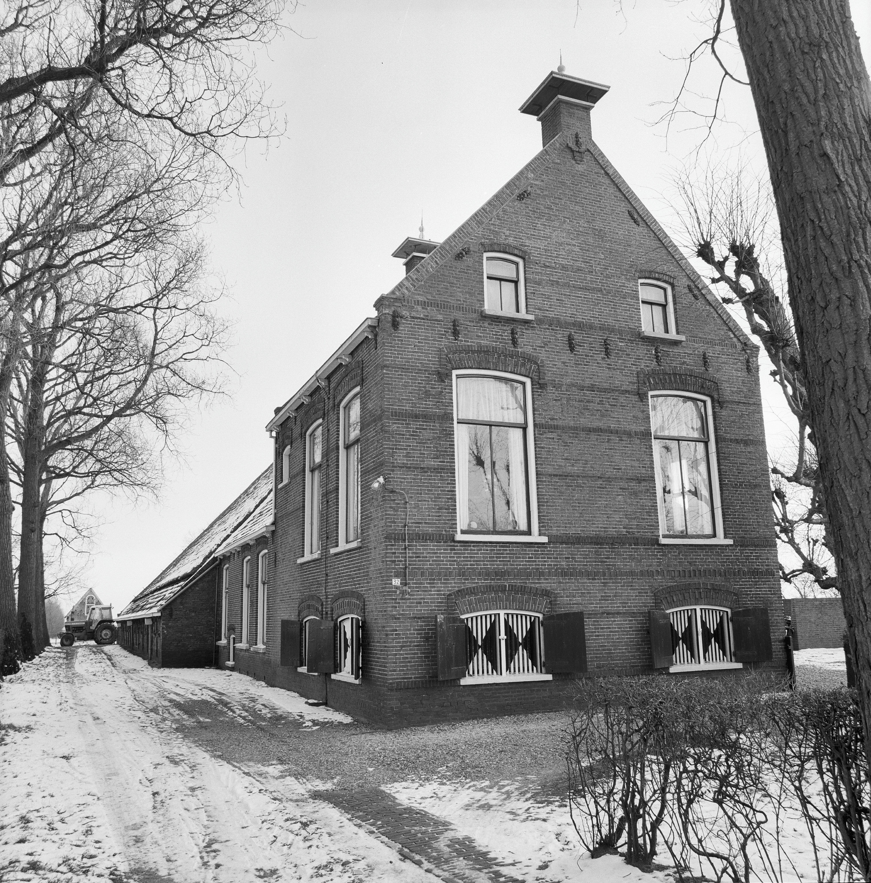 voorzijde